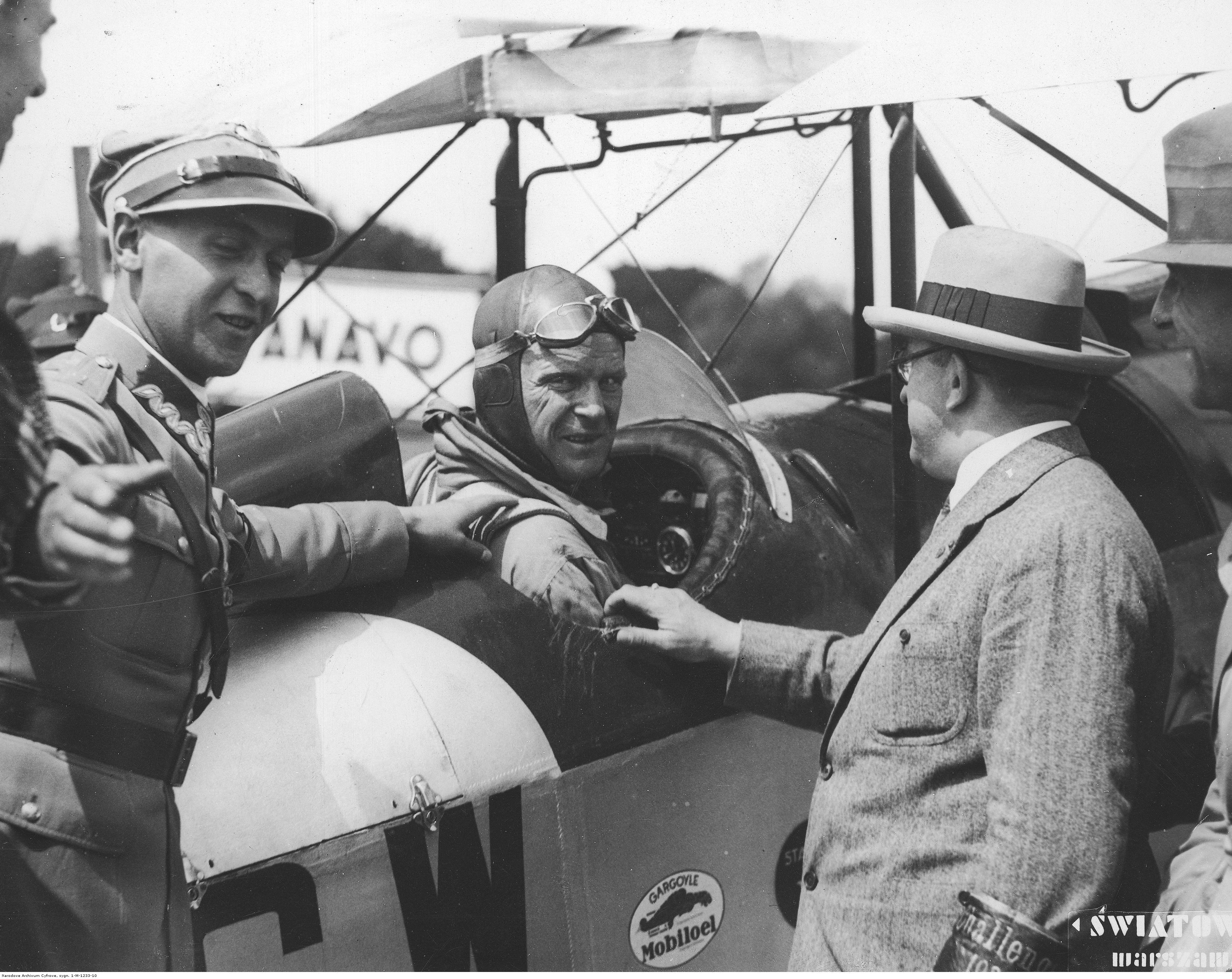 Ignacy Giedgowd podczas Challenge 1930. Lotnisko Mokotowskie